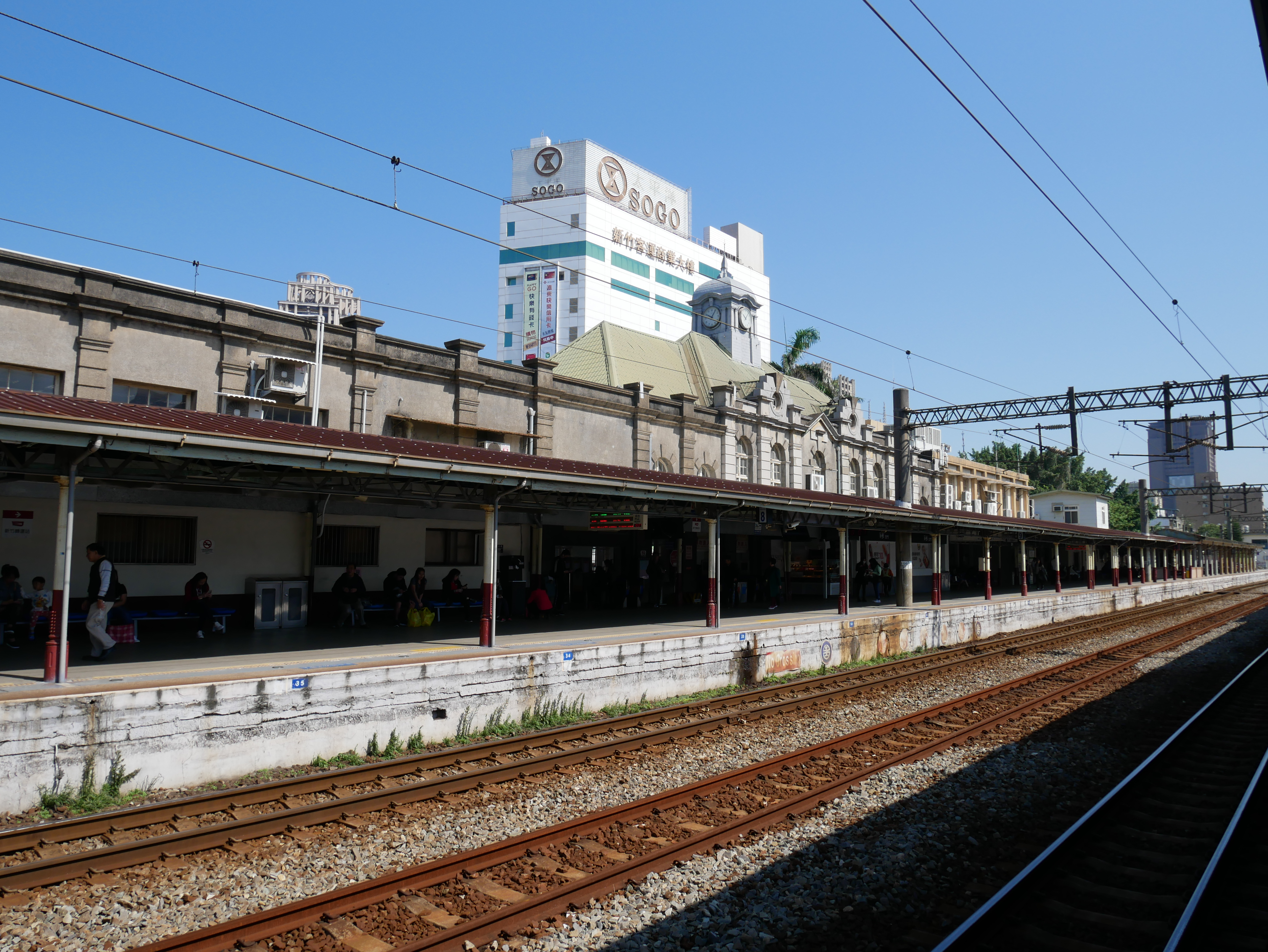 臺鐵新竹車站站房內側，新竹市東區東門聯里榮光里